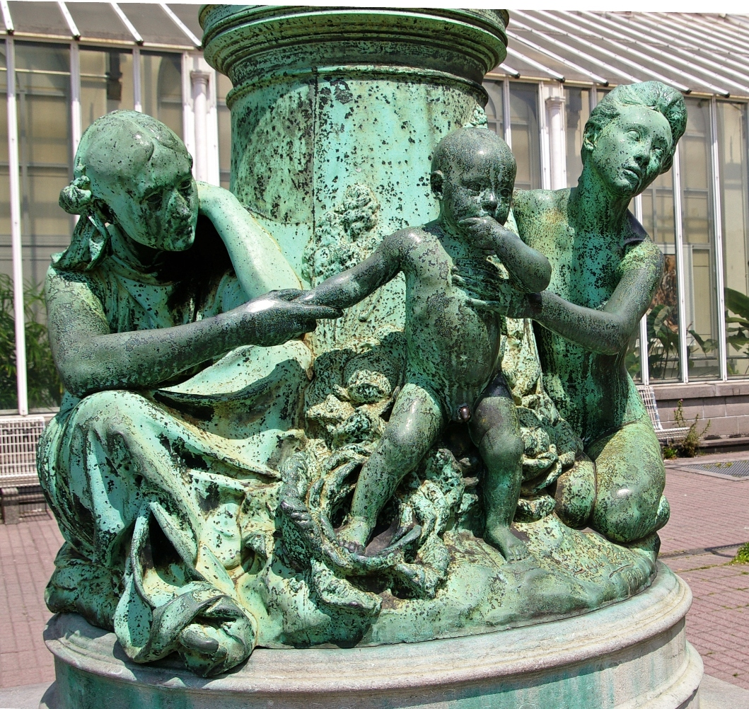 «Les Quatre Âges» par Jules Lagae, Jardin Botanique de Bruxelles.